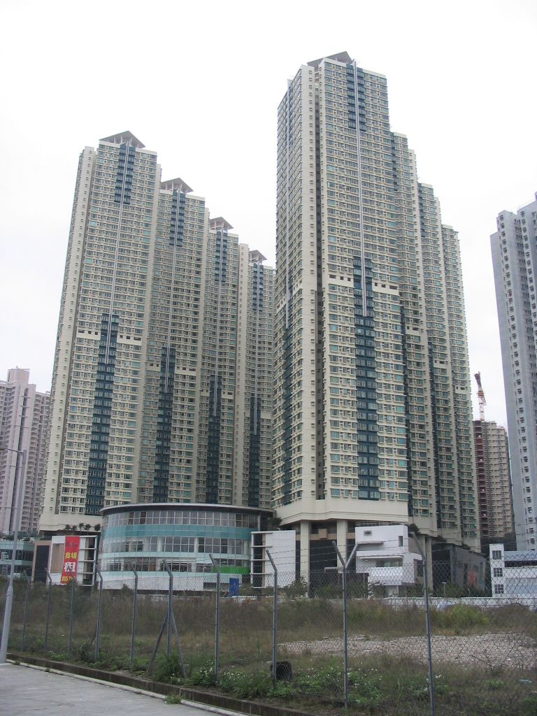 將軍澳廣場 Tseung Kwan O Plaza